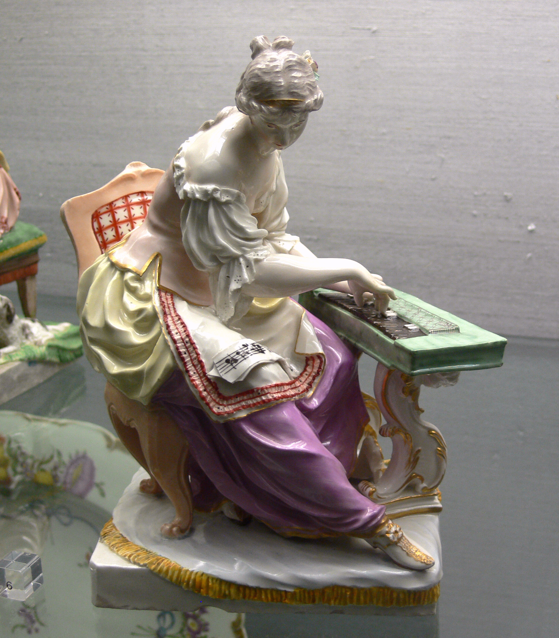 Johann Christian Wilhelm Beyer: Spinettspielerin Porzellanmanufaktur Ludwigsburg, 1766 Kunstgewerbemuseum Berlin, Inv. HF 502